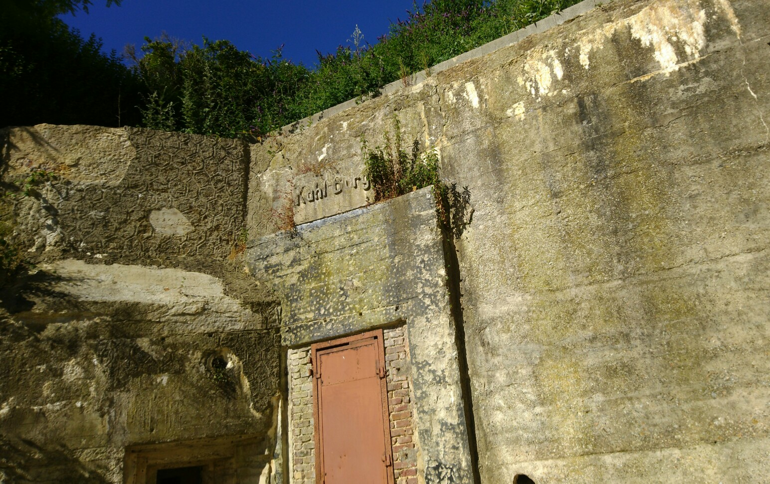 LE TREPORT (76) - Entrée du Kahl-Burg